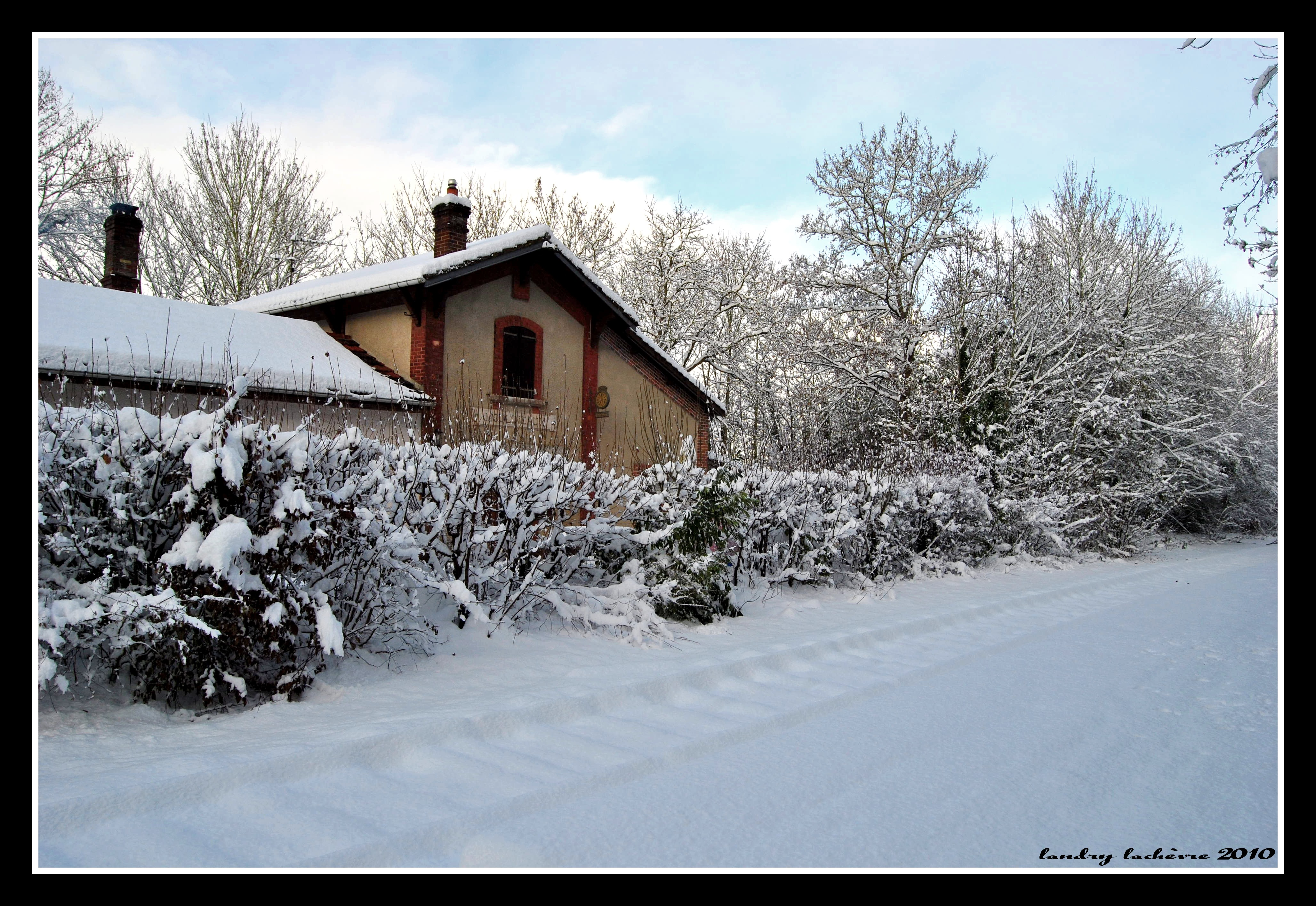 L'ancienne gare de Moulineaux (76) sur la ligne de St Georges Motel à Grand Quevilly.